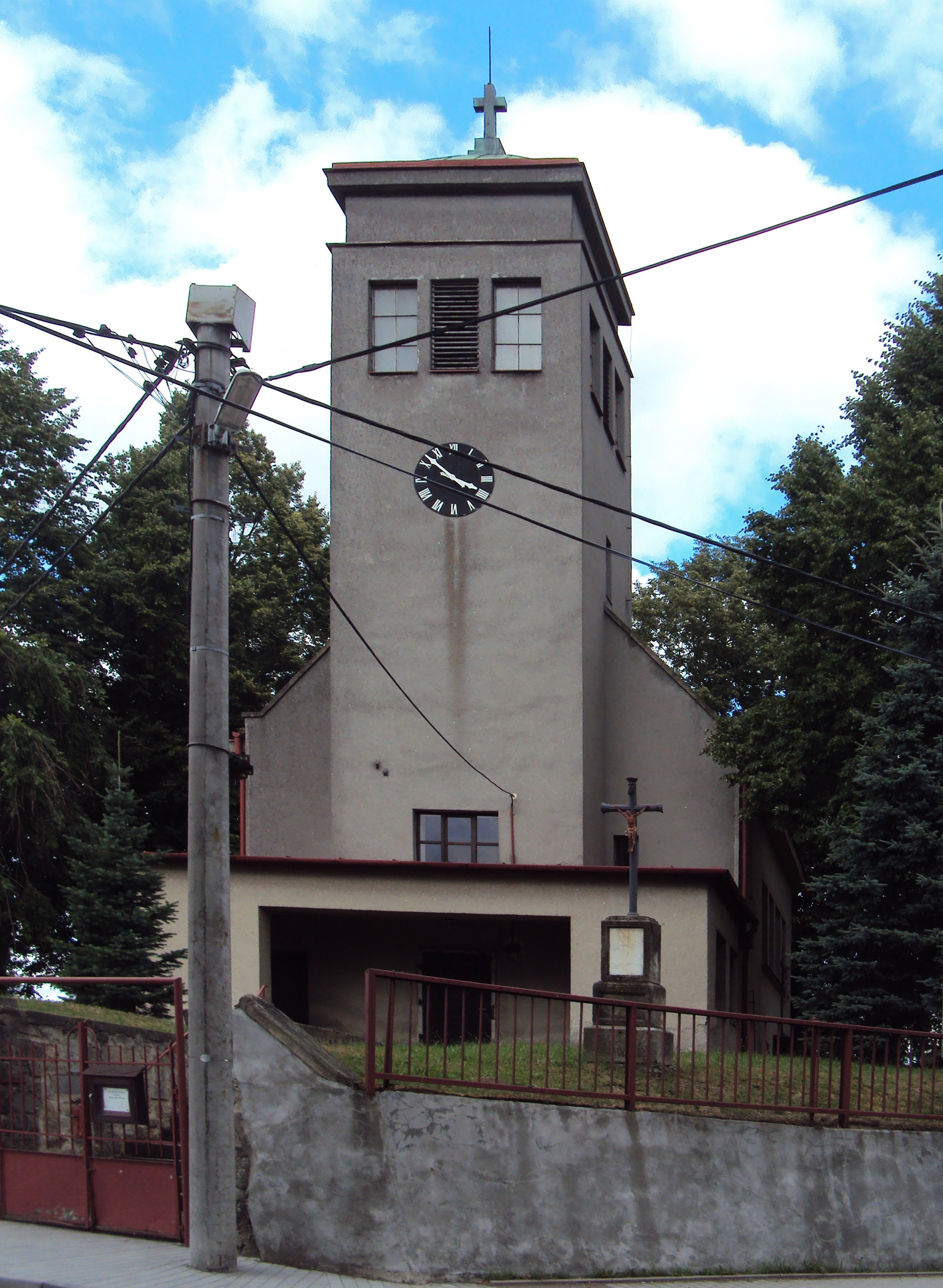 Smrčná, obec v okrese Jihlava, kostel sv. Mikuláše